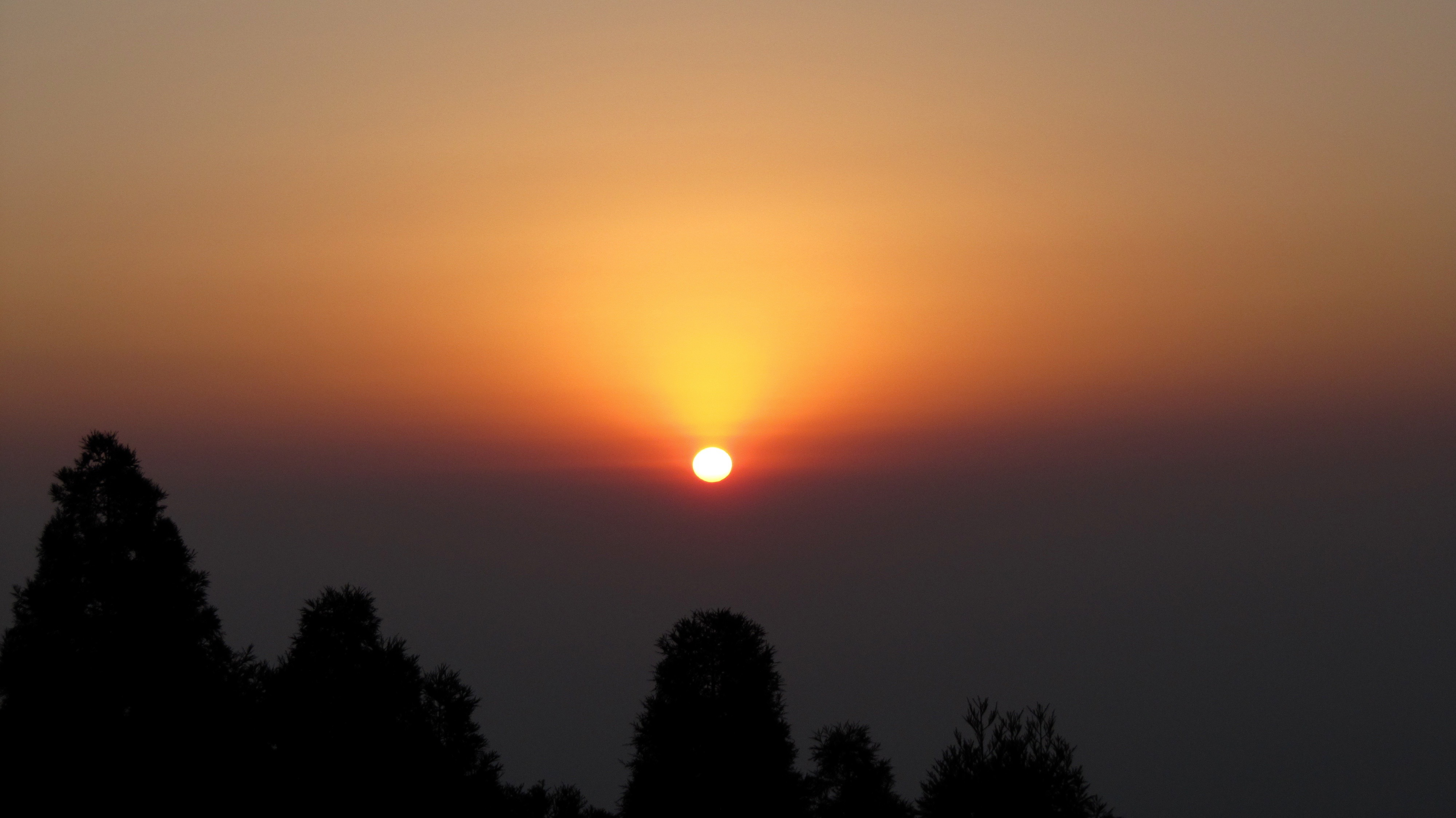 नेपाली: ईलामको श्रीअन्तुबाट देखिएको सुर्योदय